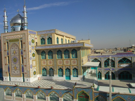 عکس از شهرداری محترم /بارگزاری علی اکبری